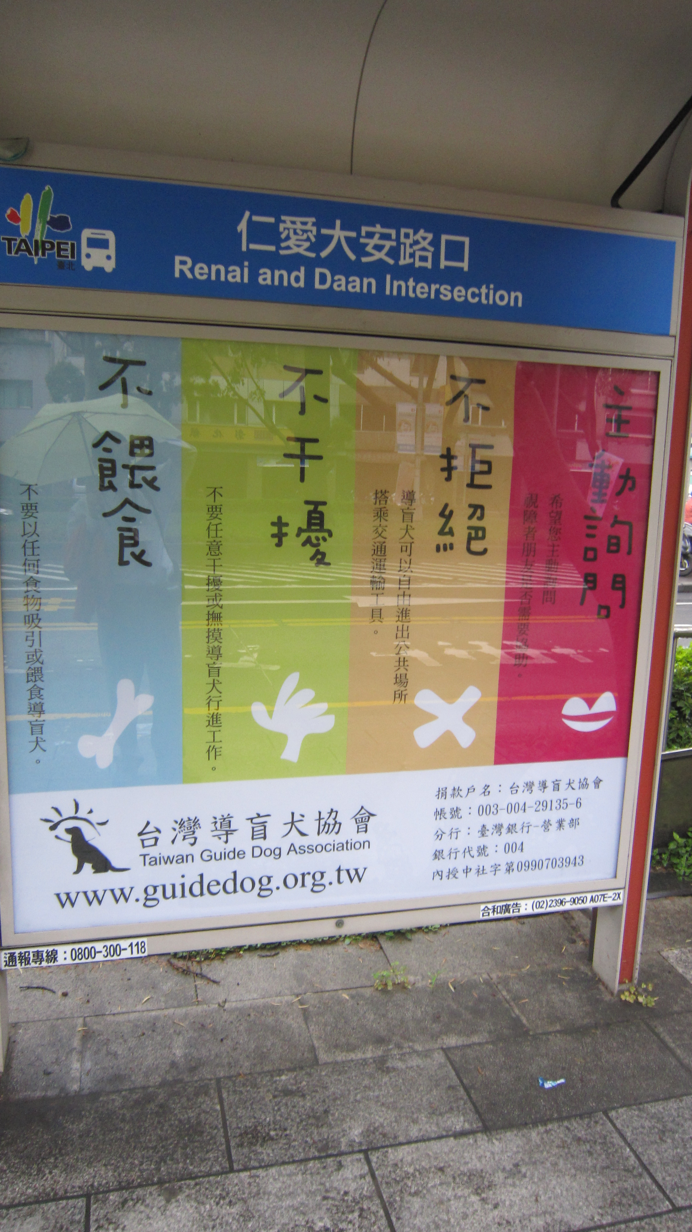 中文（台灣）: 臺北市聯營公車「仁愛大安路口」候車亭，台灣導盲犬協會廣告海報。